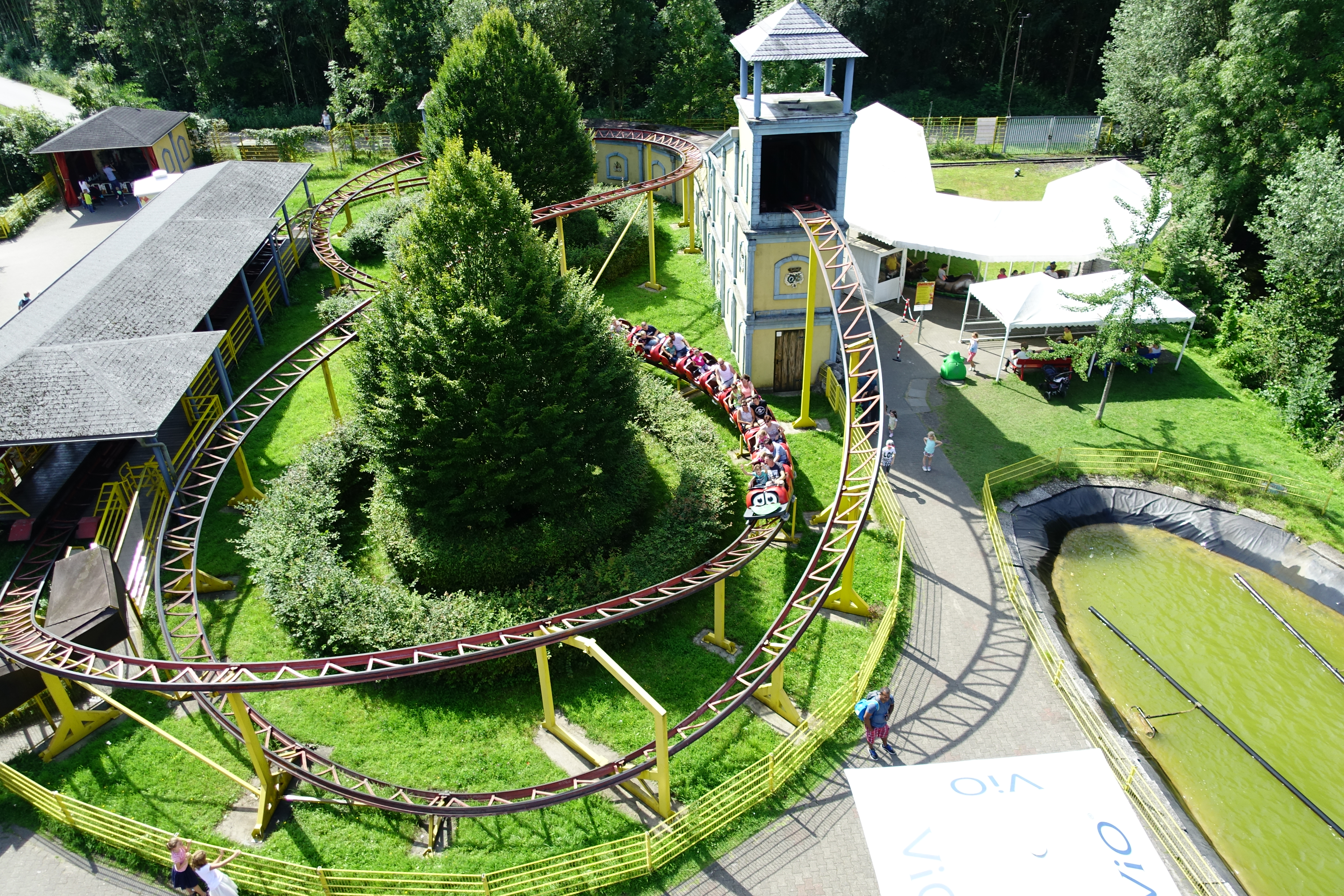 Schloss Beck mit Freizeitpark, Kirchhellen-Feldhausen. Sommer 2017.